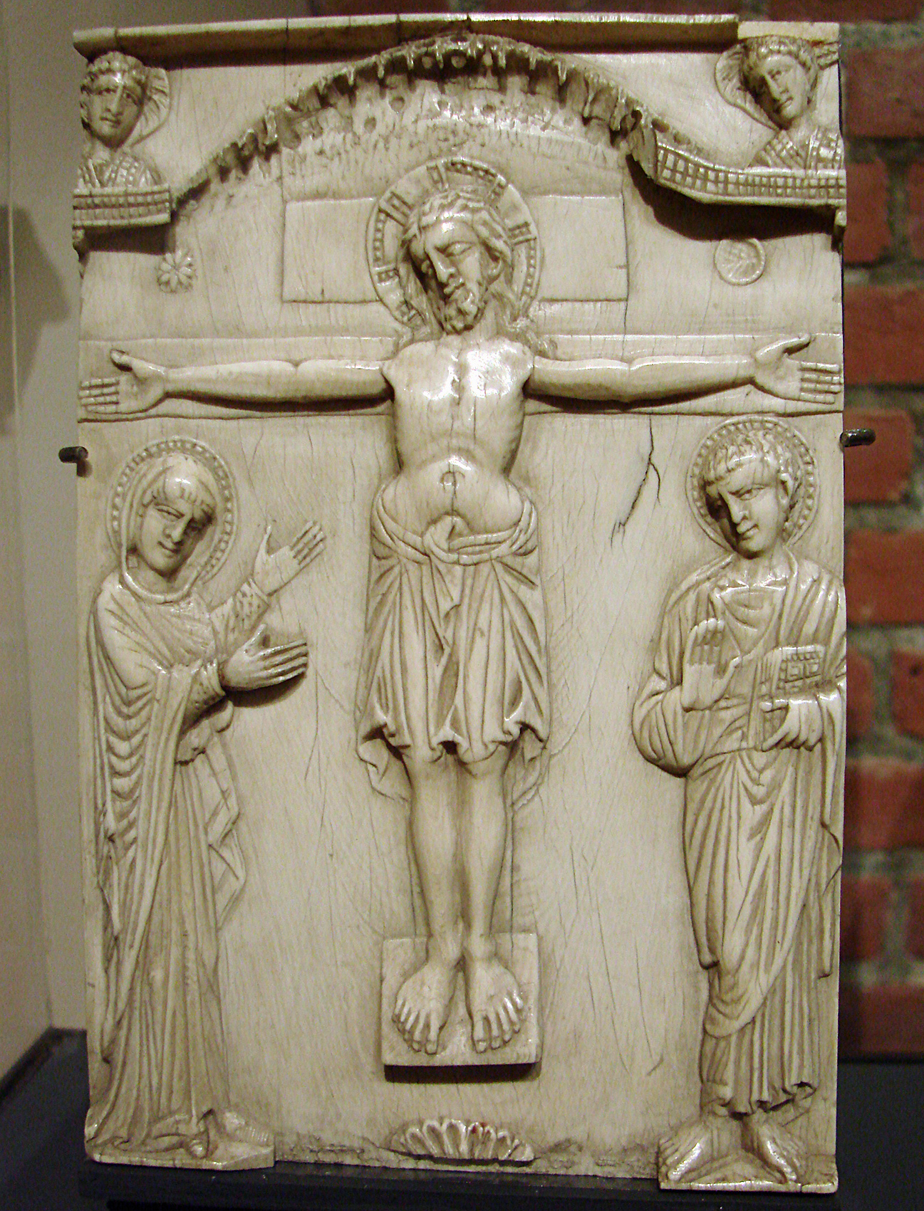 Plaque d'évangéliaire de la Deisis, ivoire, Byzance, fin du 10ème siècle. Musée des Beaux-Arts de Lille.